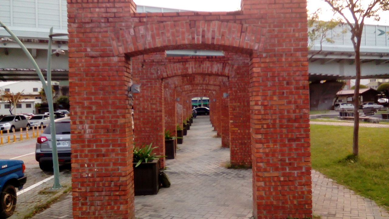 位於嘉雄陸橋下 台一線旁